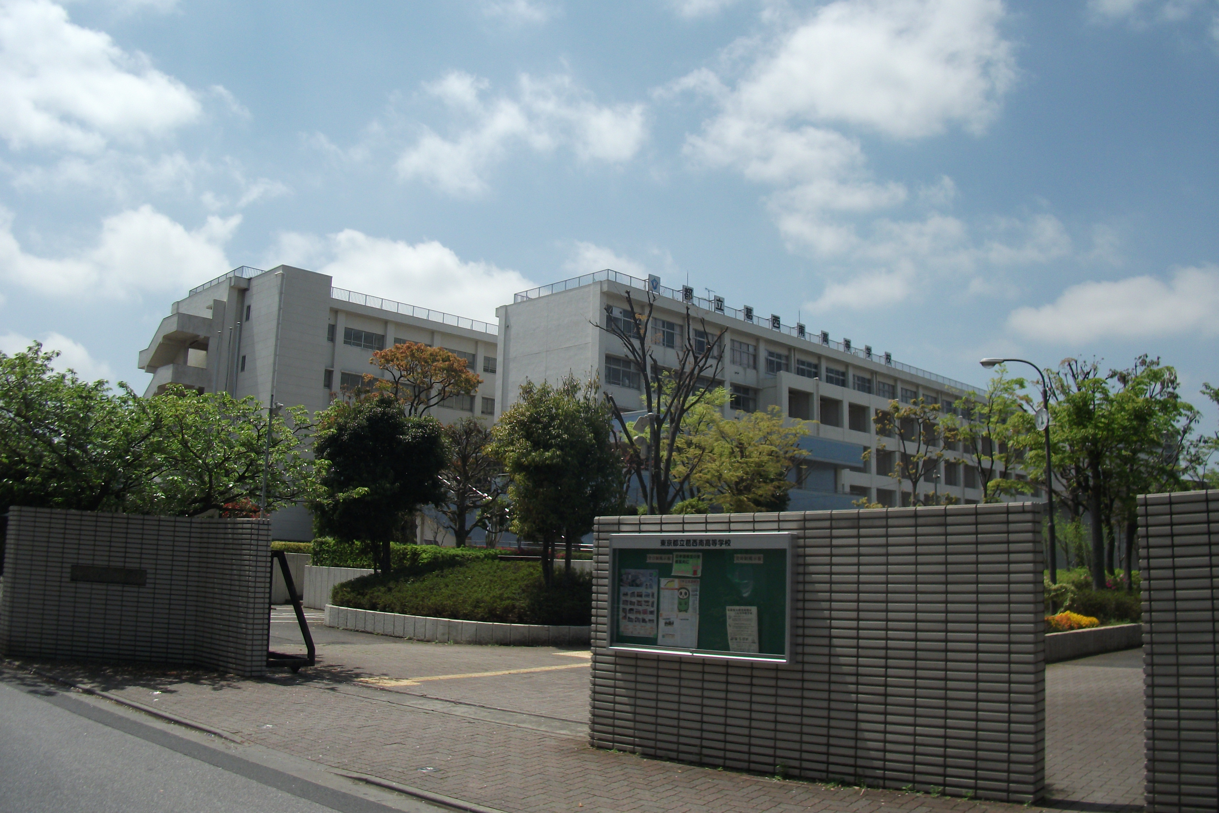 東京都立葛西南高等学校